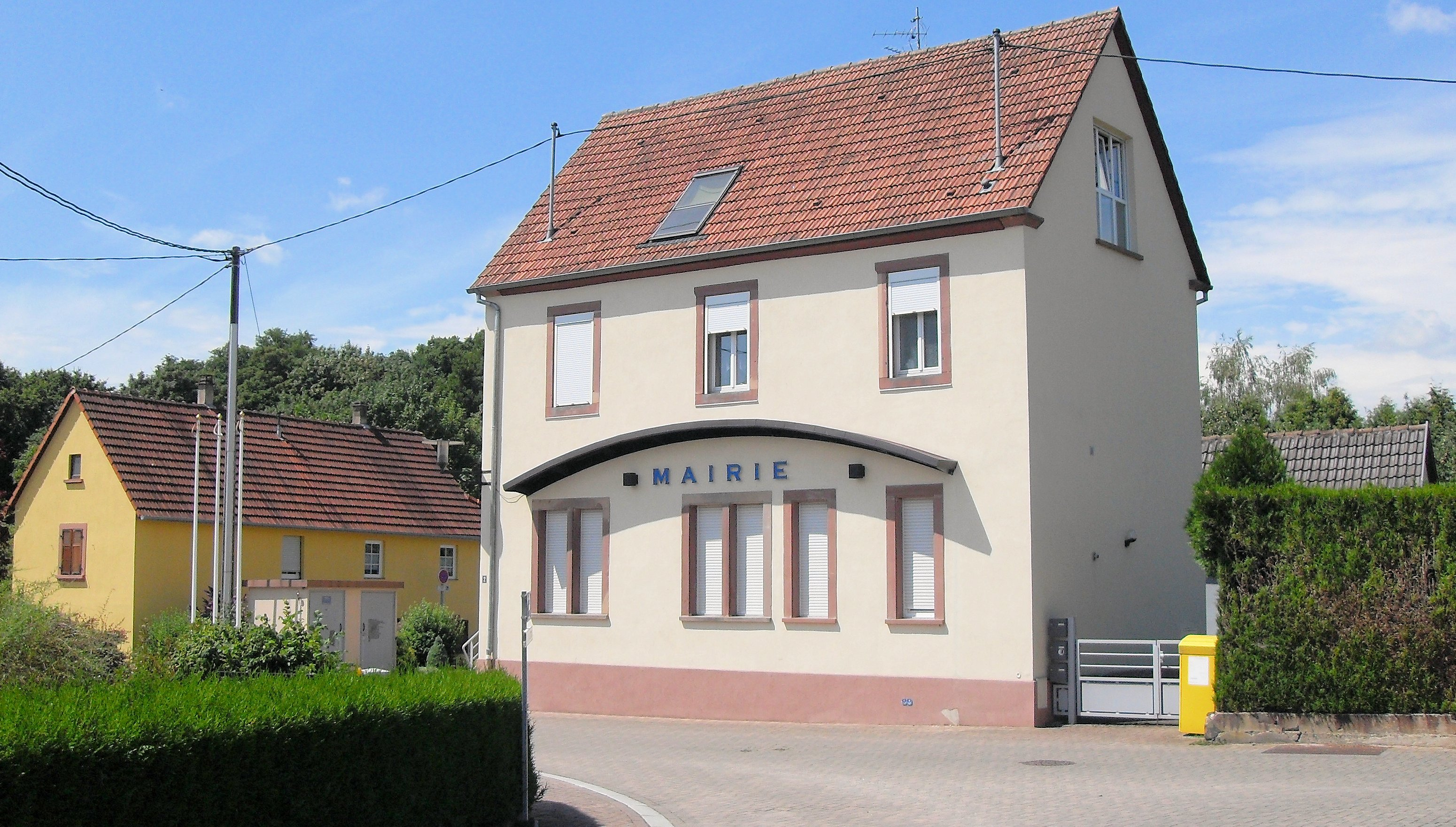 La mairie de Schirrhoffen